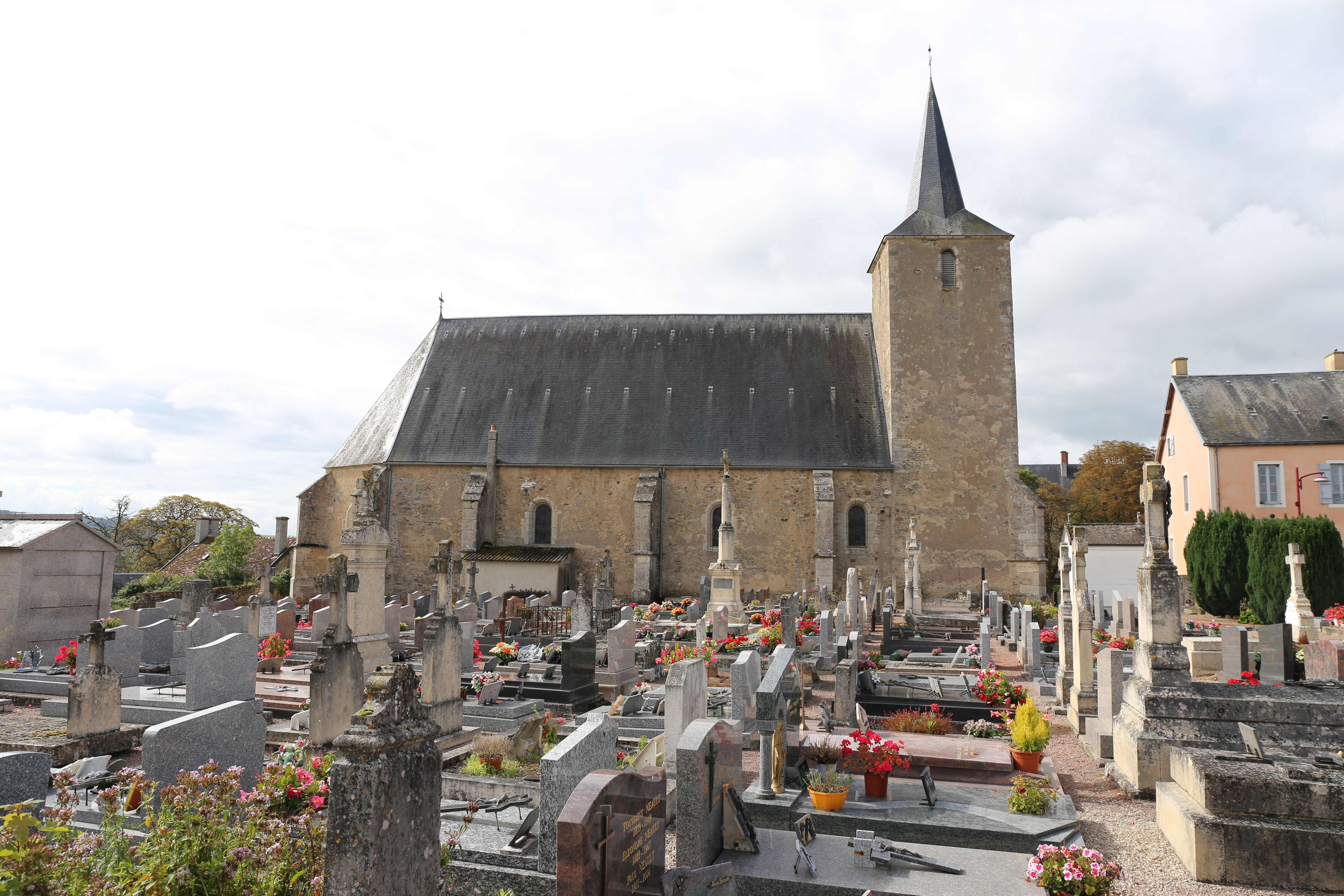 Église Saint-Pierre et cimetière de Thoisy-la-Berchère. .